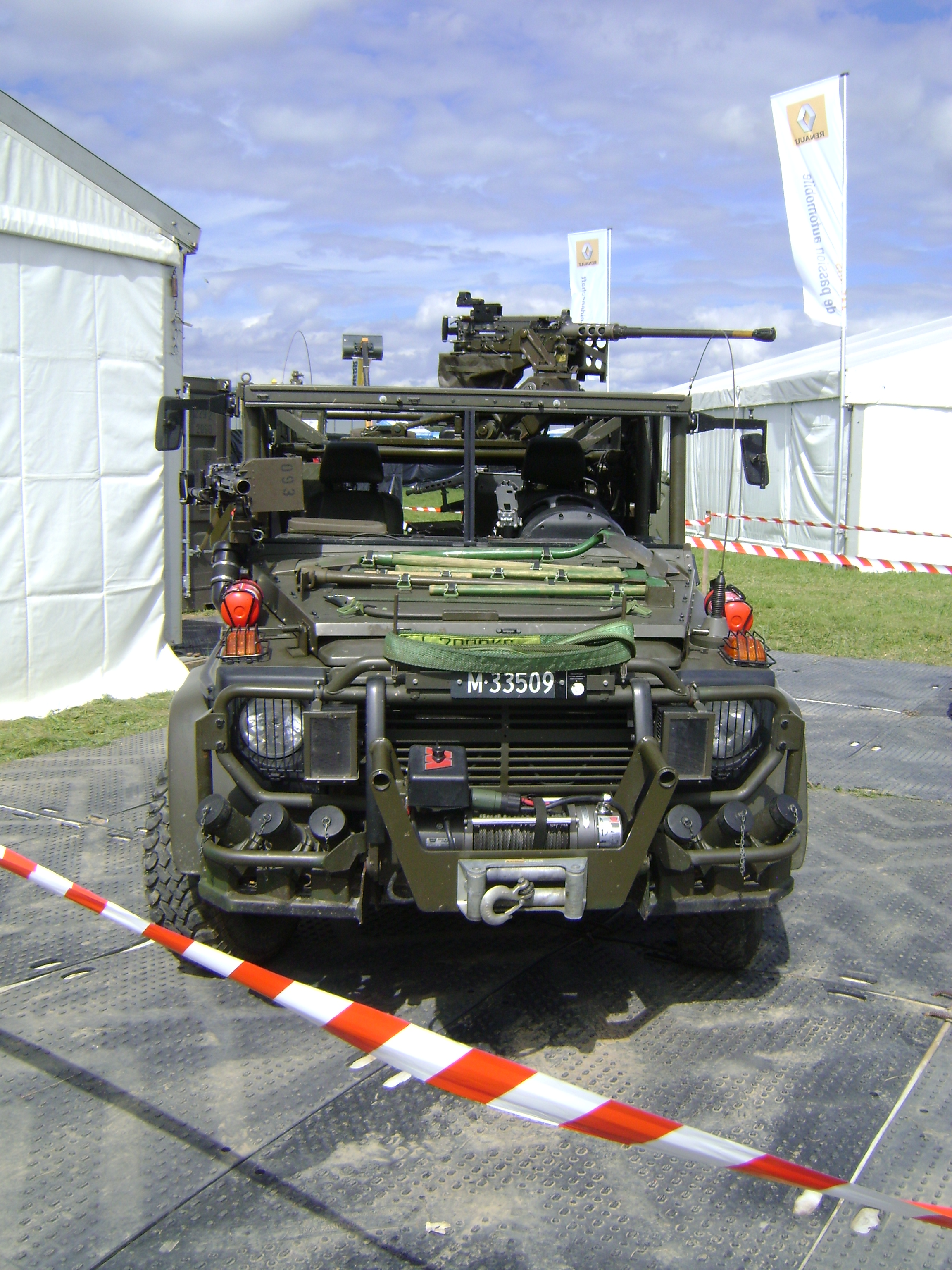 KSK Fahrzeug